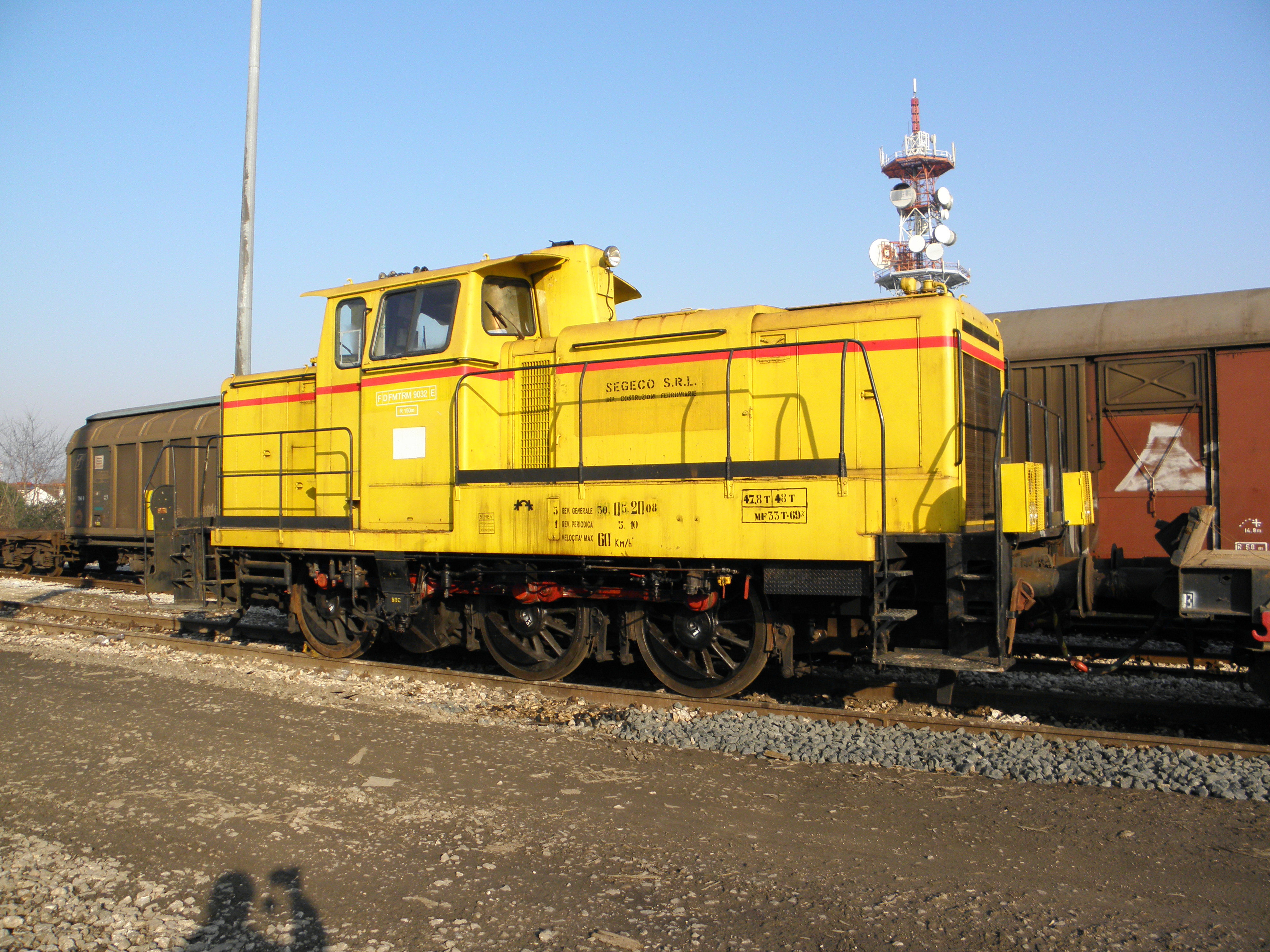 Locomotiva diesel da manovra ripresa nella stazione di Rovigo.